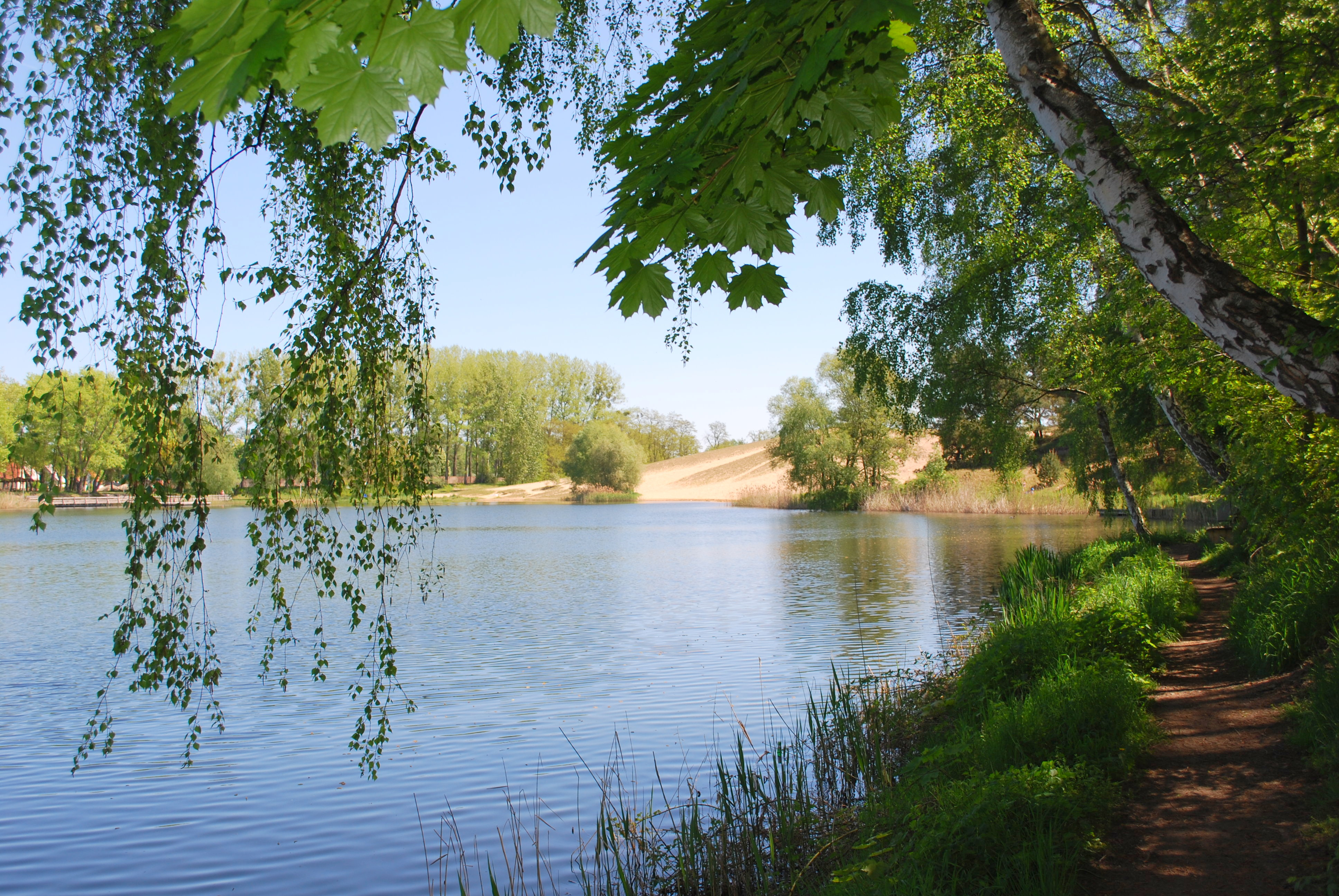 Der Kulk